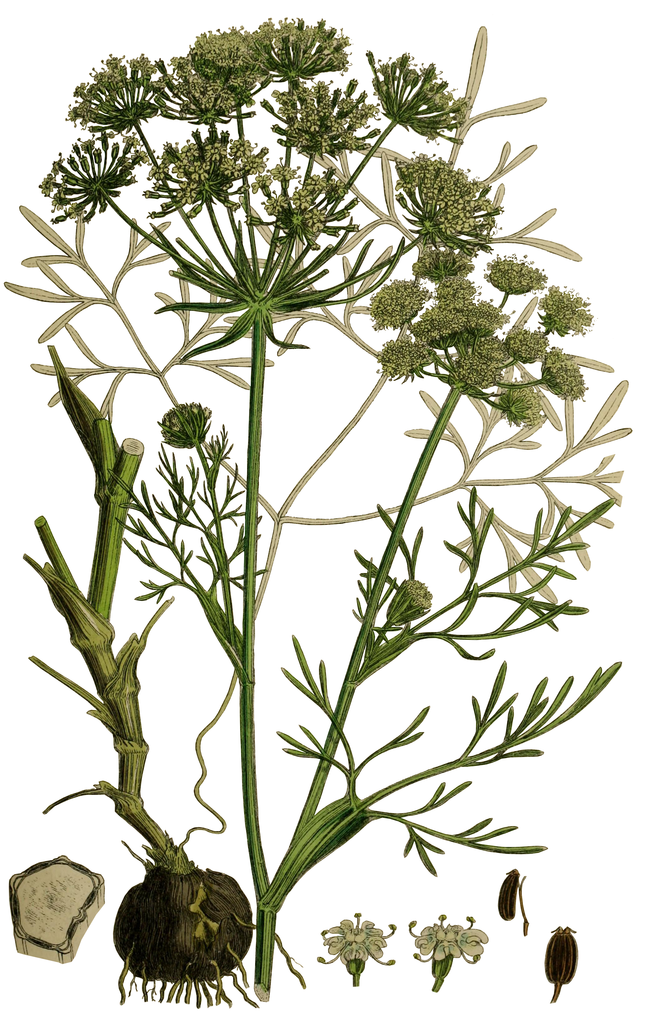 Carum bulbocastanum (L.) Koch = Bunium bulbocastanum L.